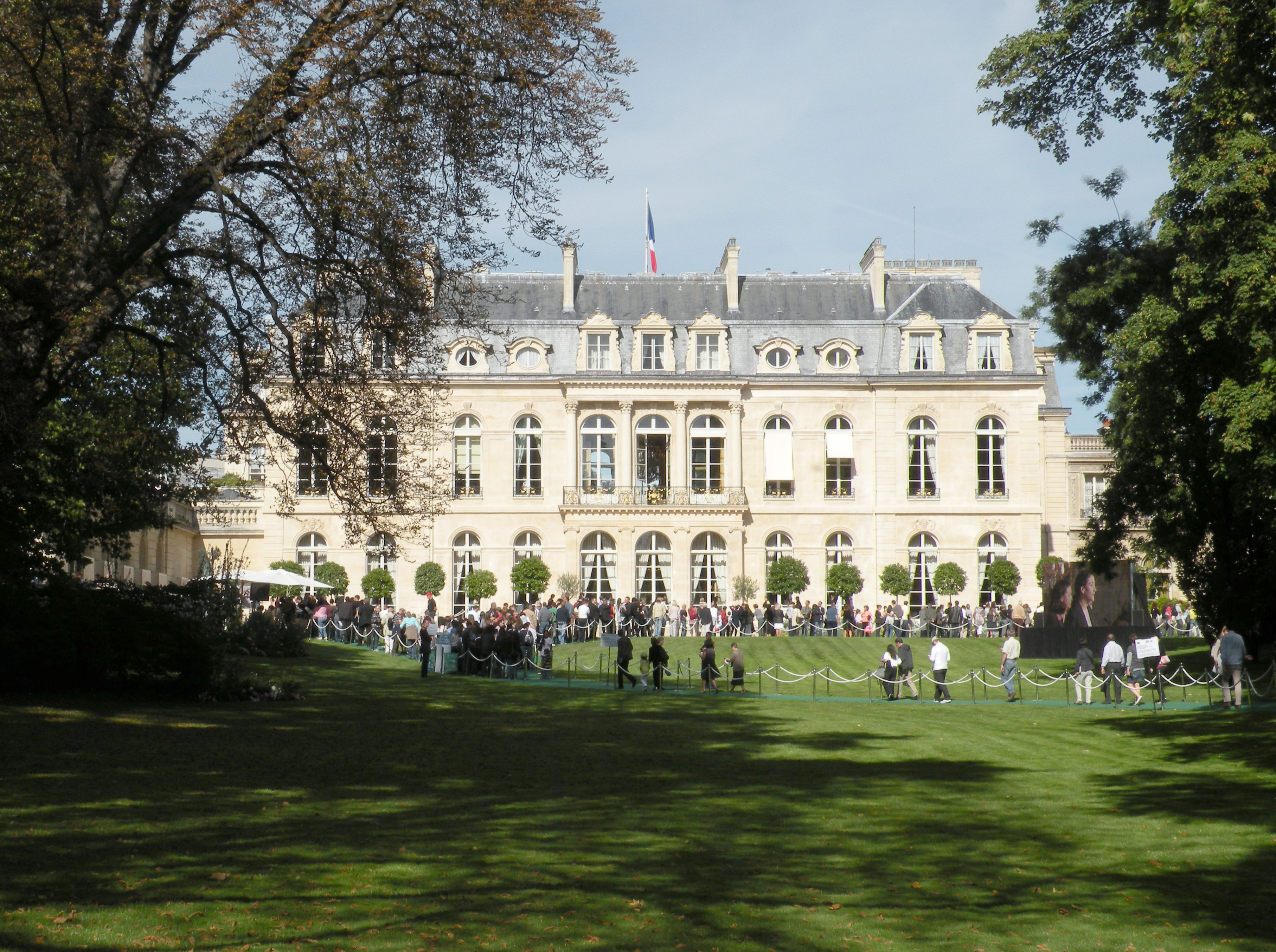 façade coté parc